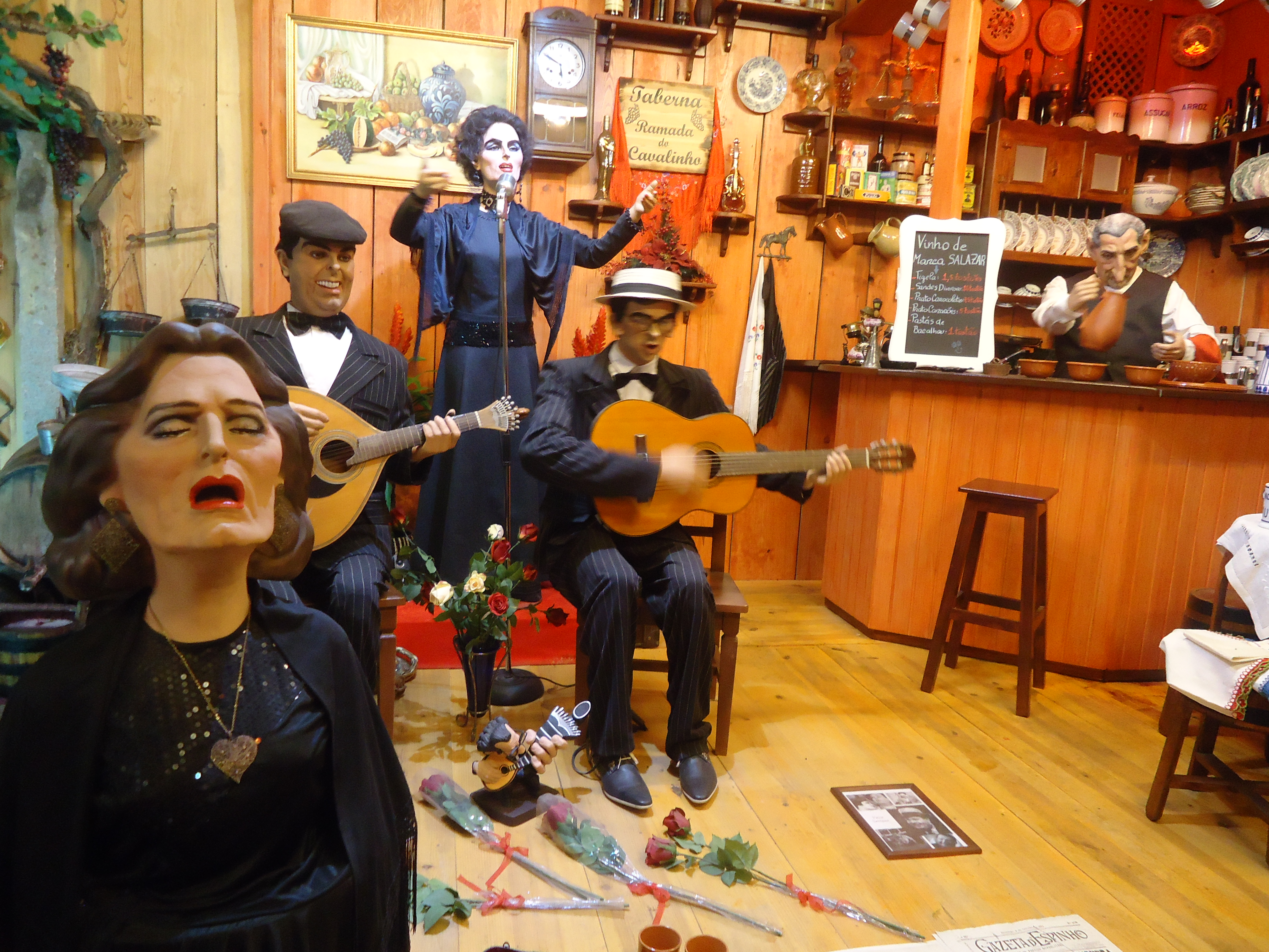 Presépio Cavalinho, São Paio de Oleiros, Portugal: Natal de 2015. Módulo em homenagem a Amália Rodrigues. Ao balcão, alegoria de Salazar.